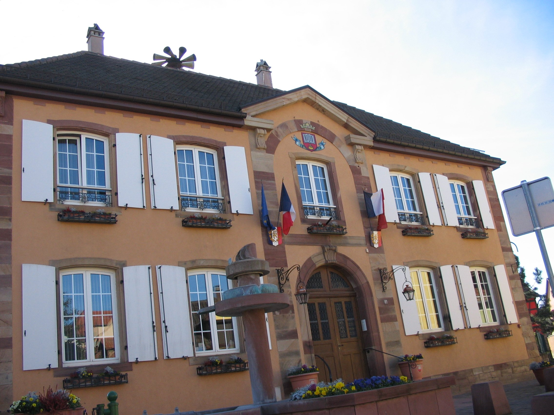 mairie de Kirchheim (Bas-Rhin), bâtiment daté de 1838.